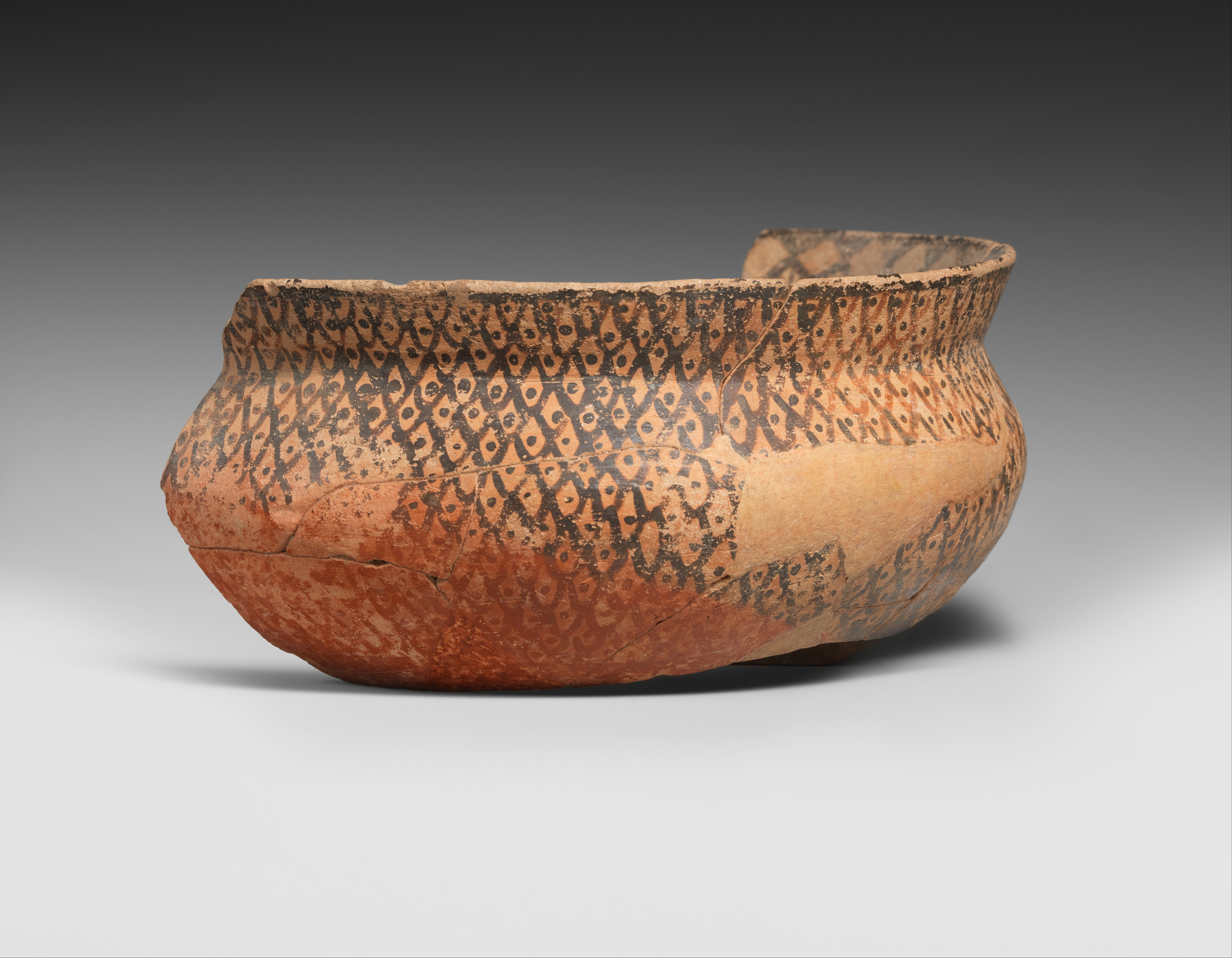 Halaf; Bowl; Ceramics-Vessels